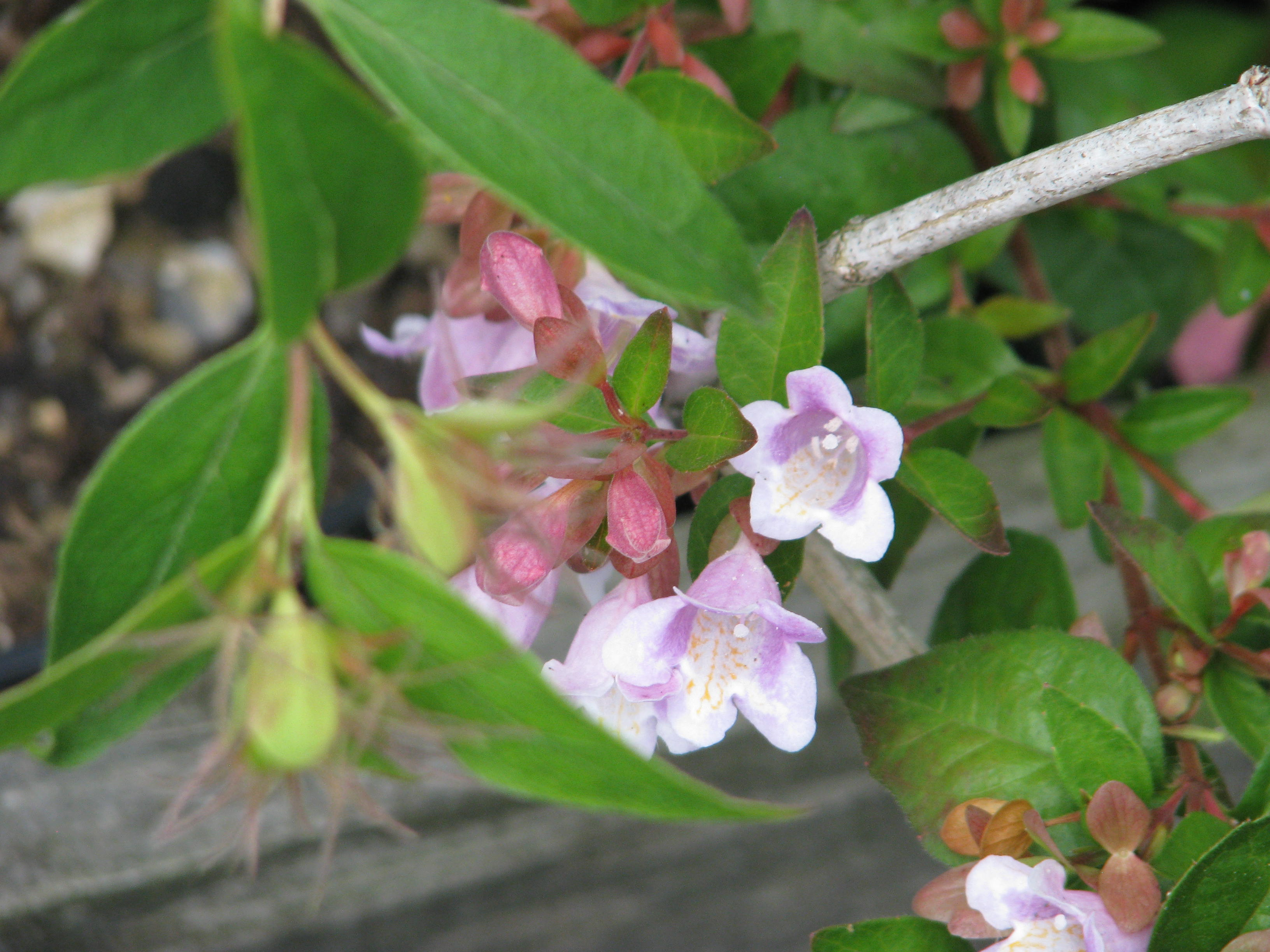 Abelia schumannii